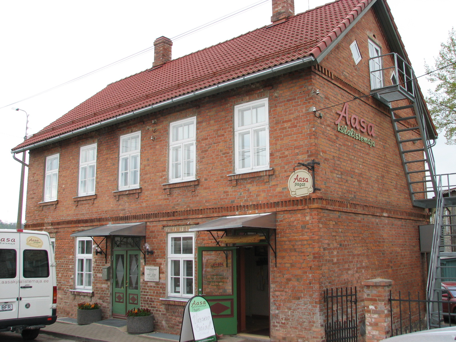 typische Architektur in Viljandi: rote Ziegelsteinhäuser mit zwei rautenförmigen Fernster im Dachgeschoss an der Giebelwand.